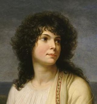 Madame Hamelin, née Jeanne Geneviève Fortunée Lormier-Lagrave (1776-1851). Mariée en 1792 à un fournisseur général aux armées, elle se fit connaître pour sa beauté, son originalité et ses liaisons célèbres, notamment avec Bonaparte. Figure de premier plan dans le petit monde des merveilleuses, elle lança les robes « à la sauvage » et la couleur « cuisse de nymphe émue ».Appiabi, le plus célèbre des peintres néoclassiques italiens, fit son portrait alors qu'elle résidait à Milan, pendant les campagnes de Bonaparte.